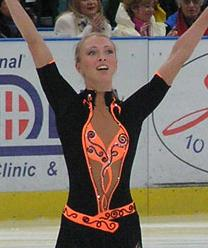 Tatiana Totmianina während der Russischen Meisterschaften 2005